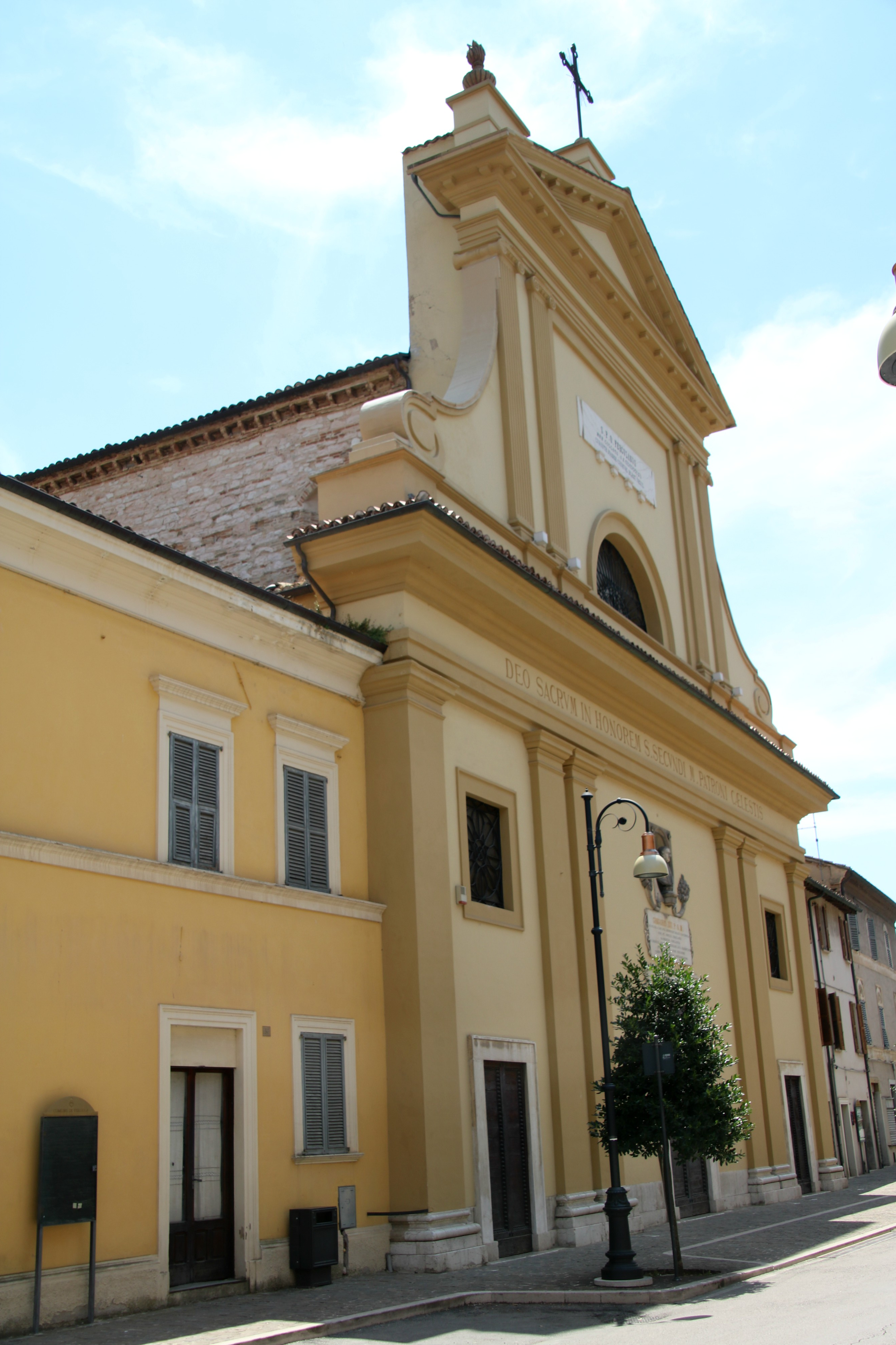 Concattedrale di Sant'Andrea apostolo (Pergola)